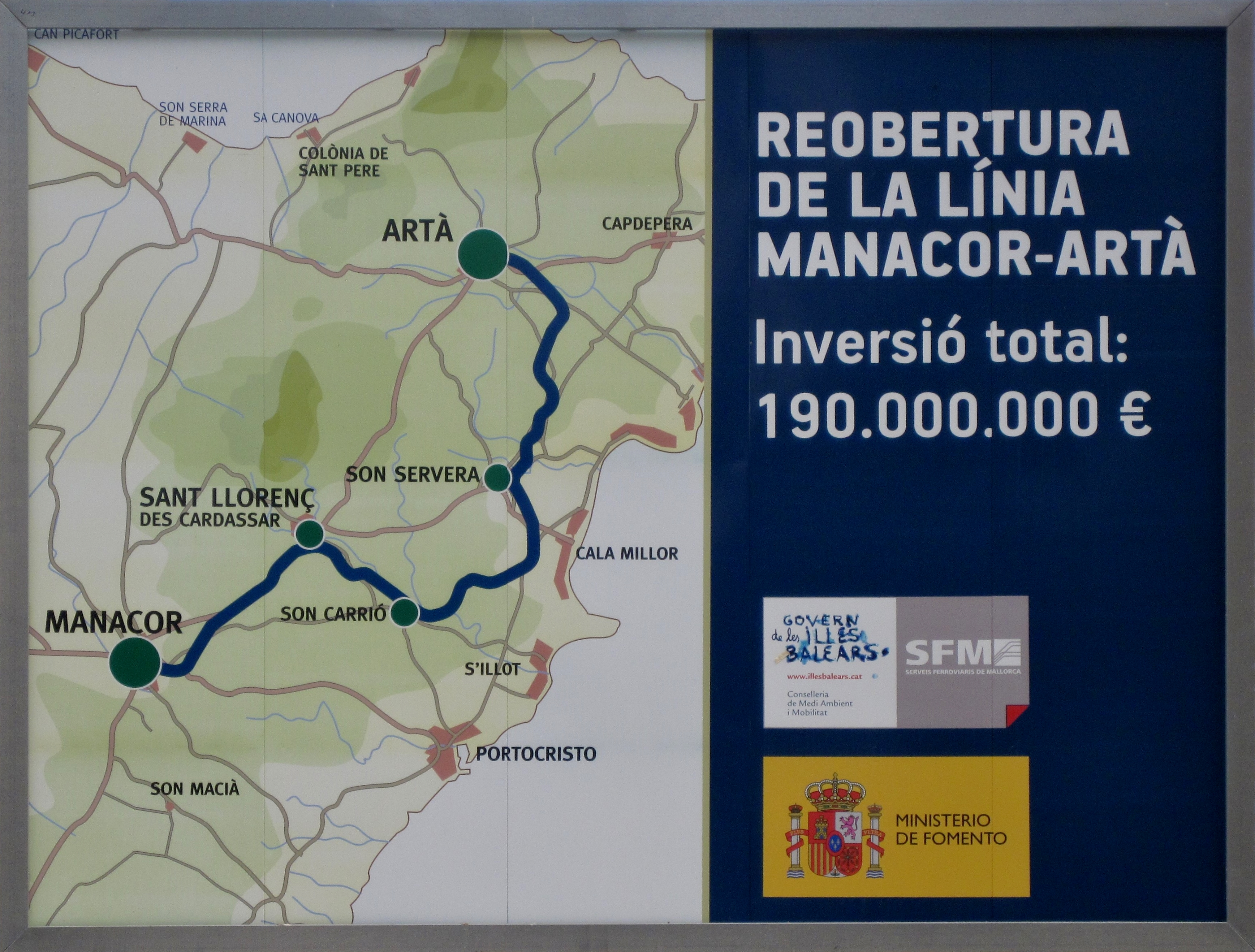 Bauschild der Bahnlinie Manacor – Artà im September 2010 am Bahnhof von Artà, Mallorca, Spanien